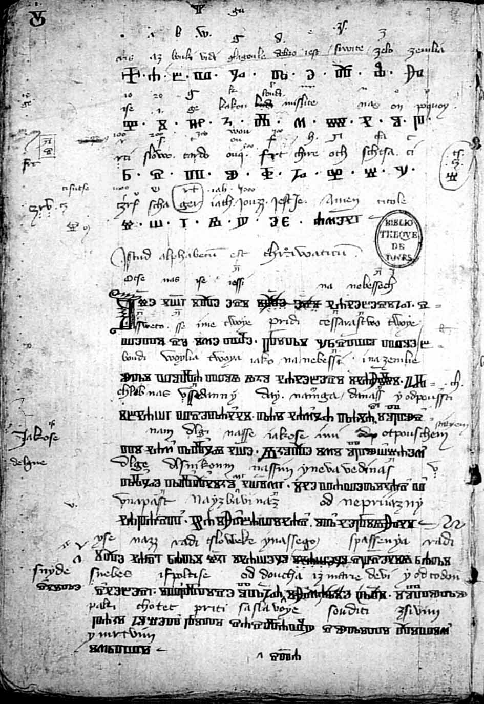 rukopis Jurja Slovinca